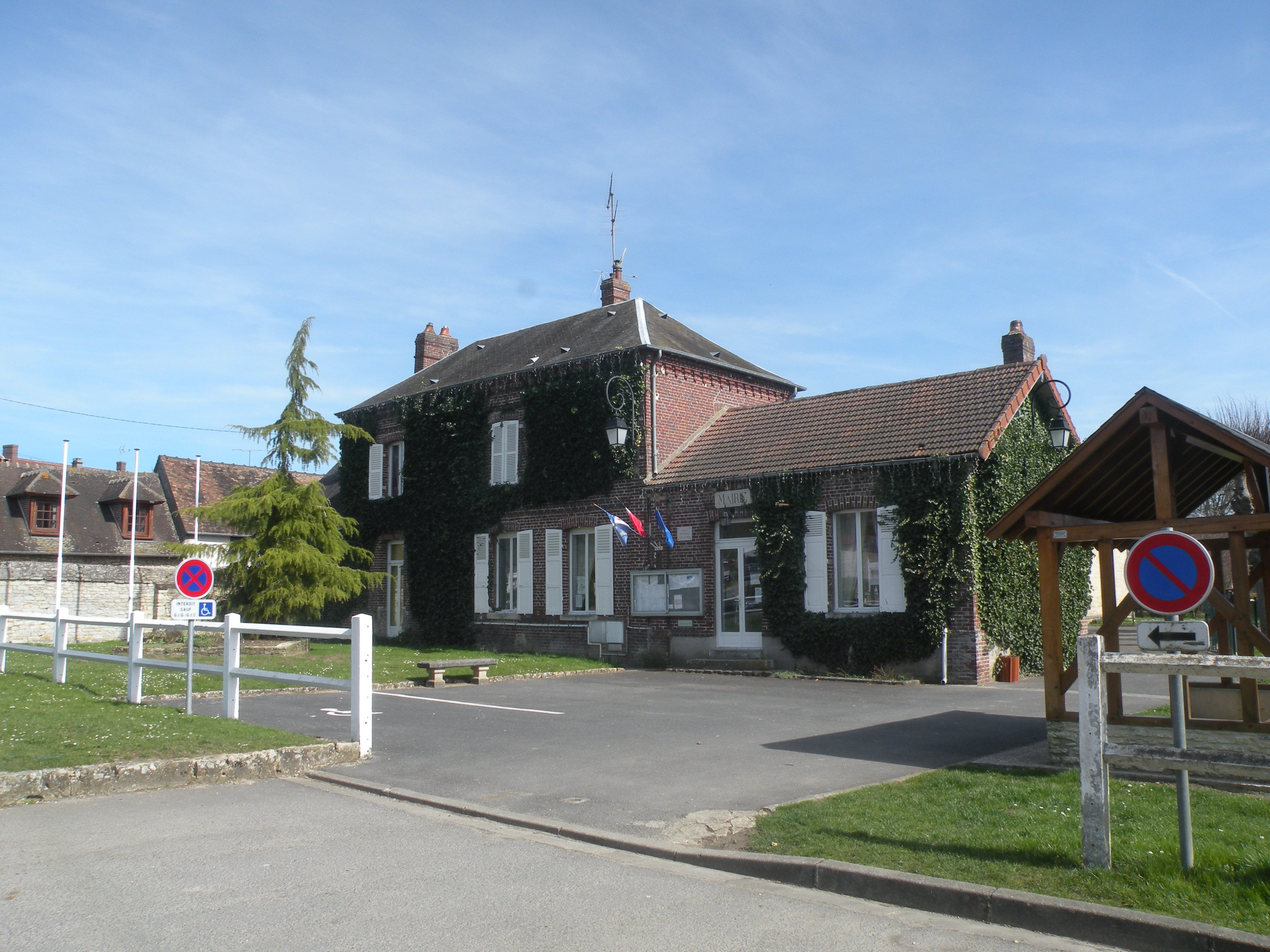 Chambors mairie